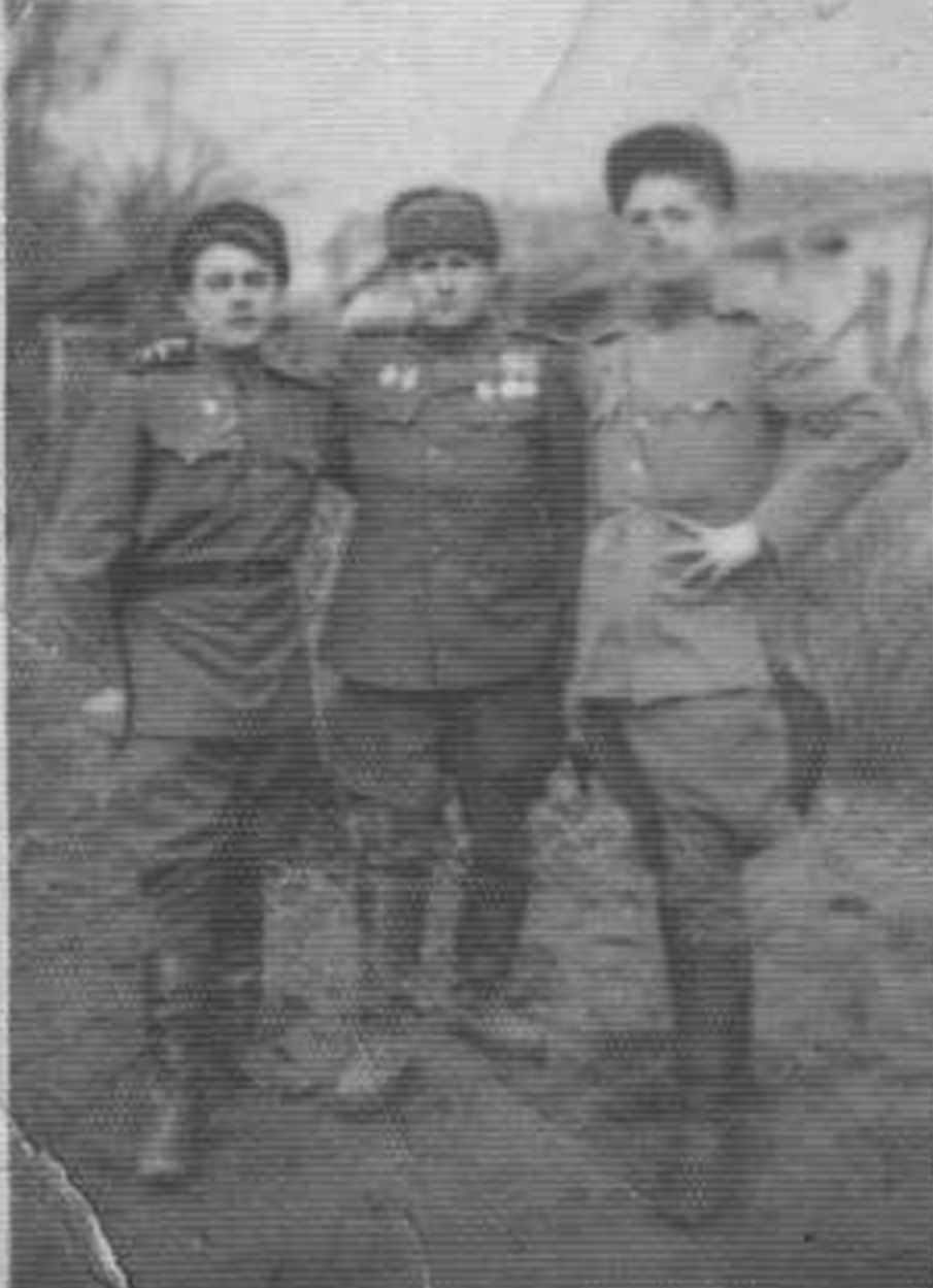 С боевыми товарищами. Весна 1944 года.